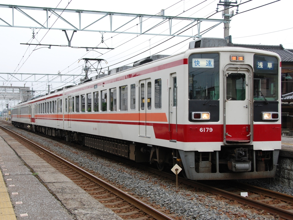 東武6050系電車6179編成・日光線「快速浅草ゆき」4両（2008/6/5・合戦場にて撮影）